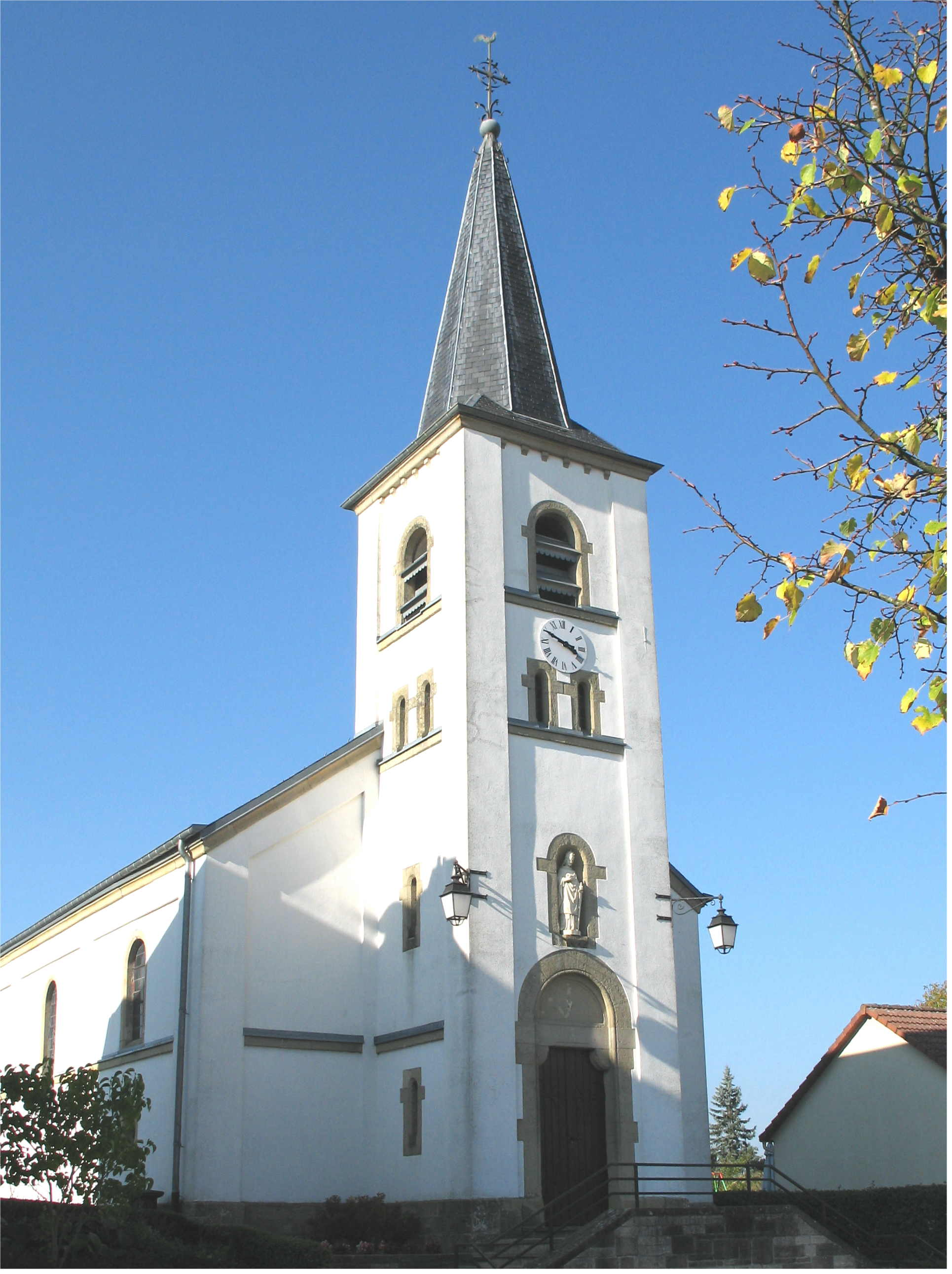 Kierch zu Angelsbierg. Angelsbierg Kategorie:Gemeng Fëschbech